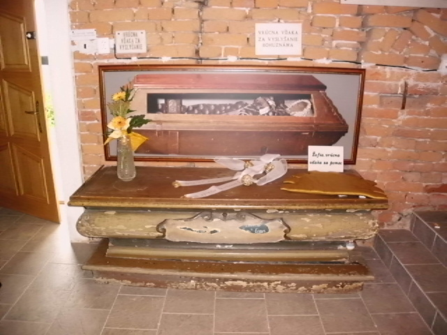 Sarg mit der mumifizierten Heiligen Sofia Bosniak